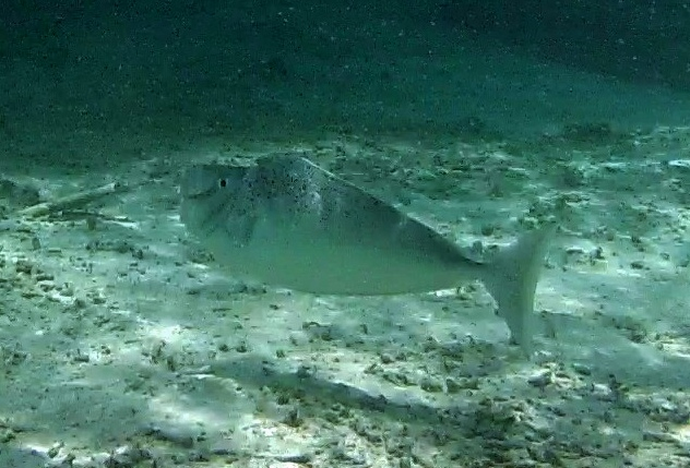 Un nason à gros nez (Naso tuberosus) aux Maldives (atoll de Baa).